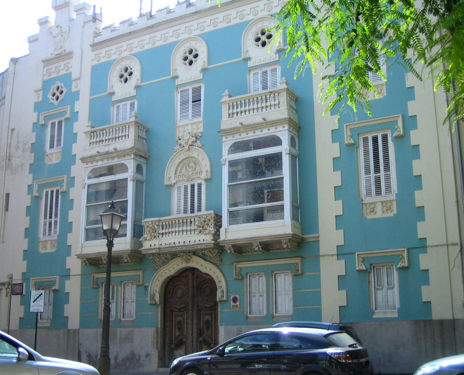 Fachada principal de la llamda "casa del Alcalde". Alzira (España).